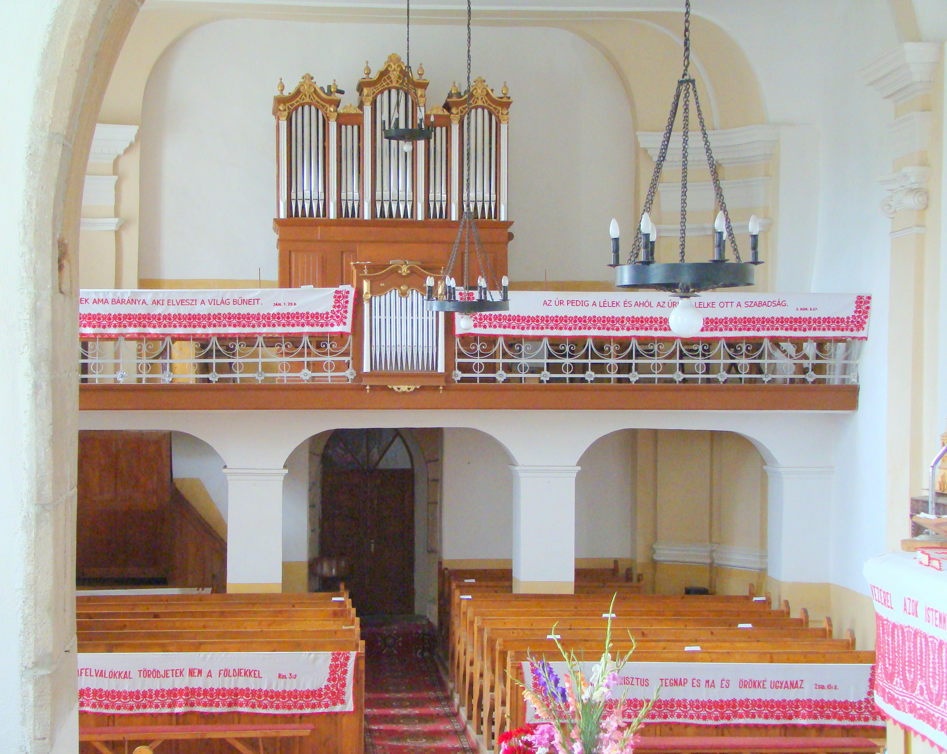 Reformed church in Reteag, Bistrița-Năsăud county, Romania